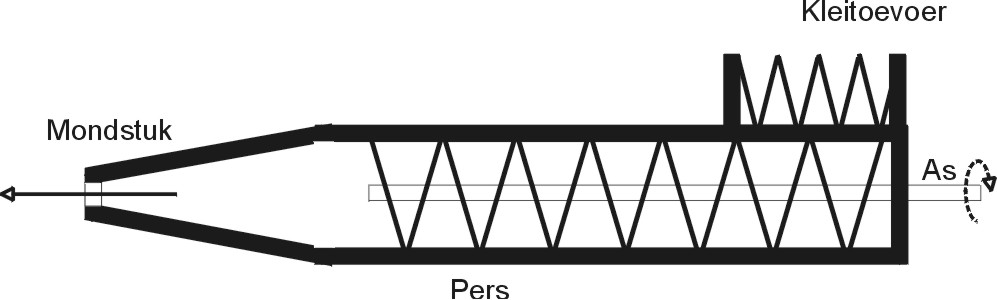 Schema strengpers